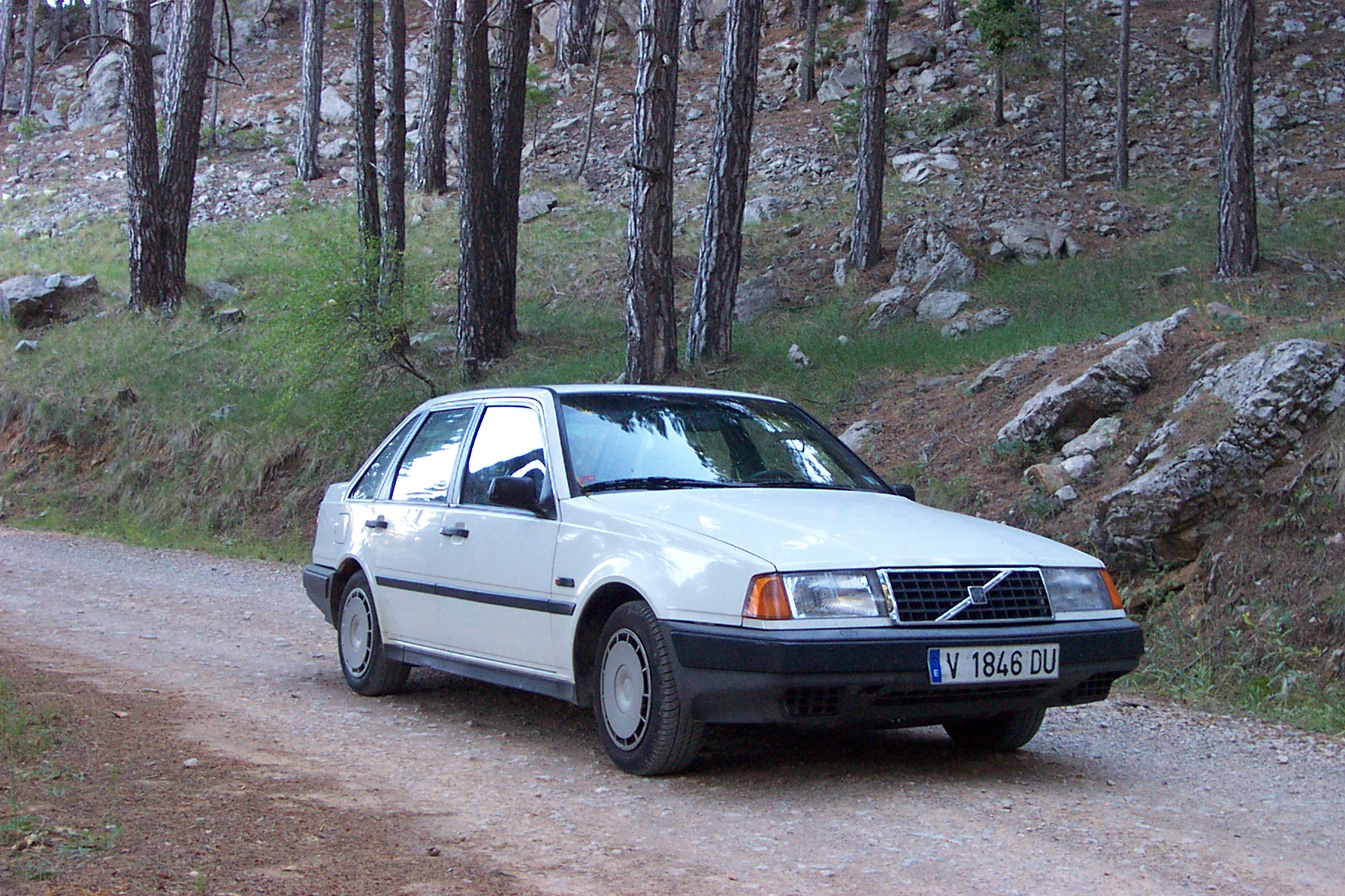 Volvo 440. Fabricado en el año 1991. Made in year 1991.